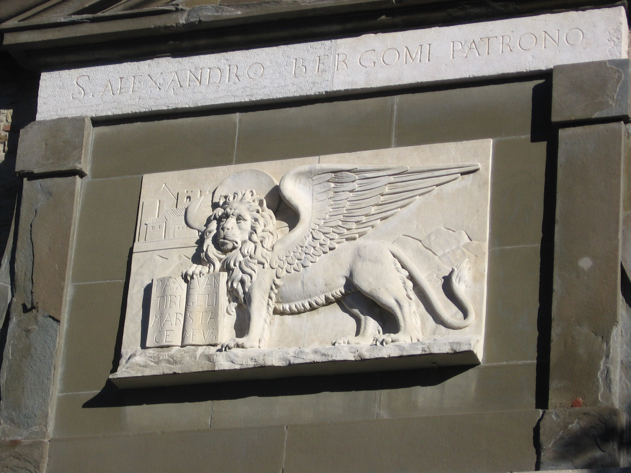 Porta Sant'Alessandro (dettaglio), Mura Venete, Bergamo, Italy